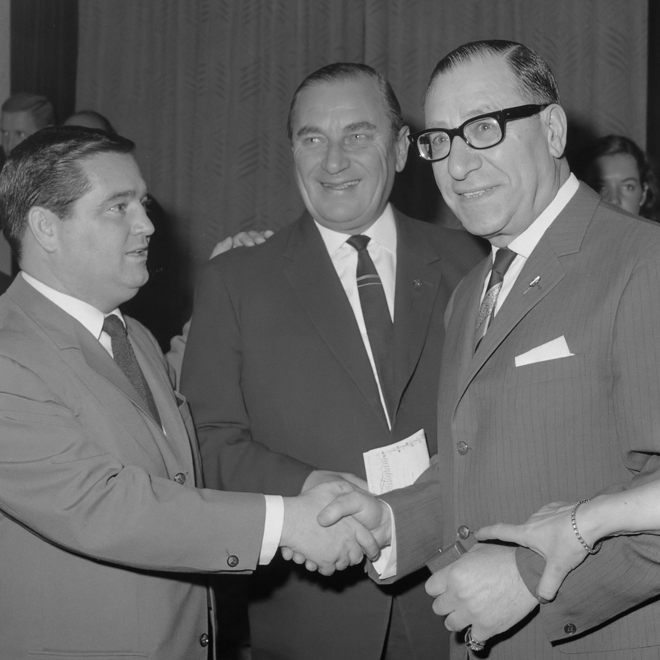 Uitreiking van De Gouden Harp 1966 in het Carlton Hotel te Amsterdam. Winnaars van de Gouden Harp de musici Bob Scholte (rechts) en Arie Maasland (midden) ontvangen de felicitaties van Willy Alberti 17 oktober 1966